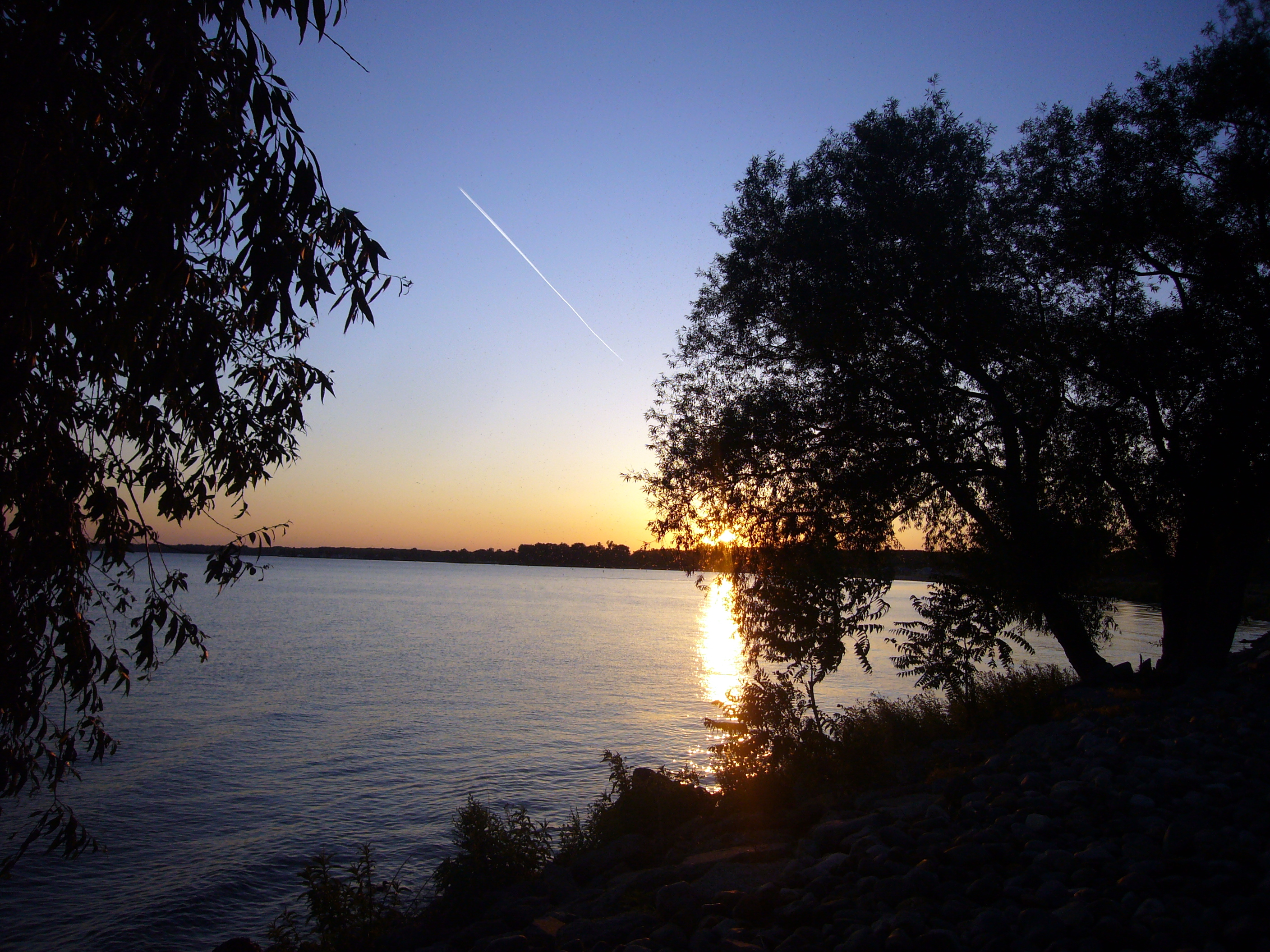 Vapour trail over St. Clair lake